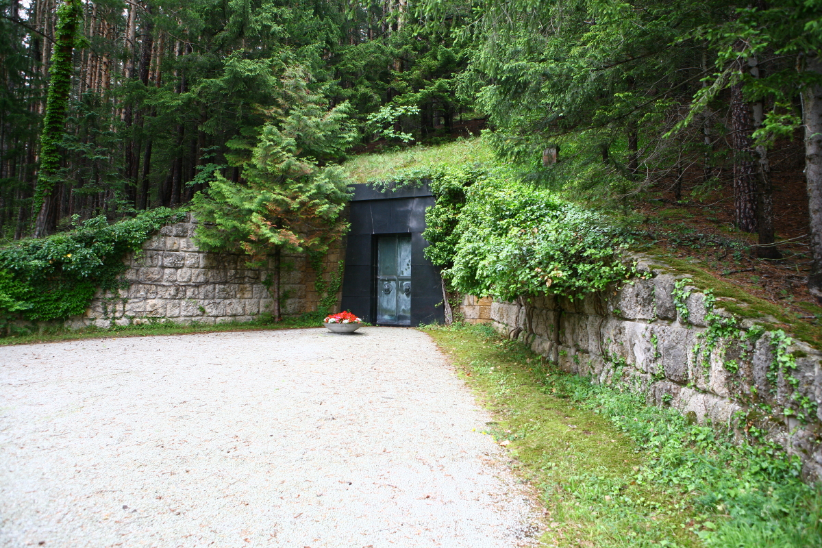 Die Gruft des österr. Bundespräsidenten Michael Hainisch in Eichberg bei Gloggnitz